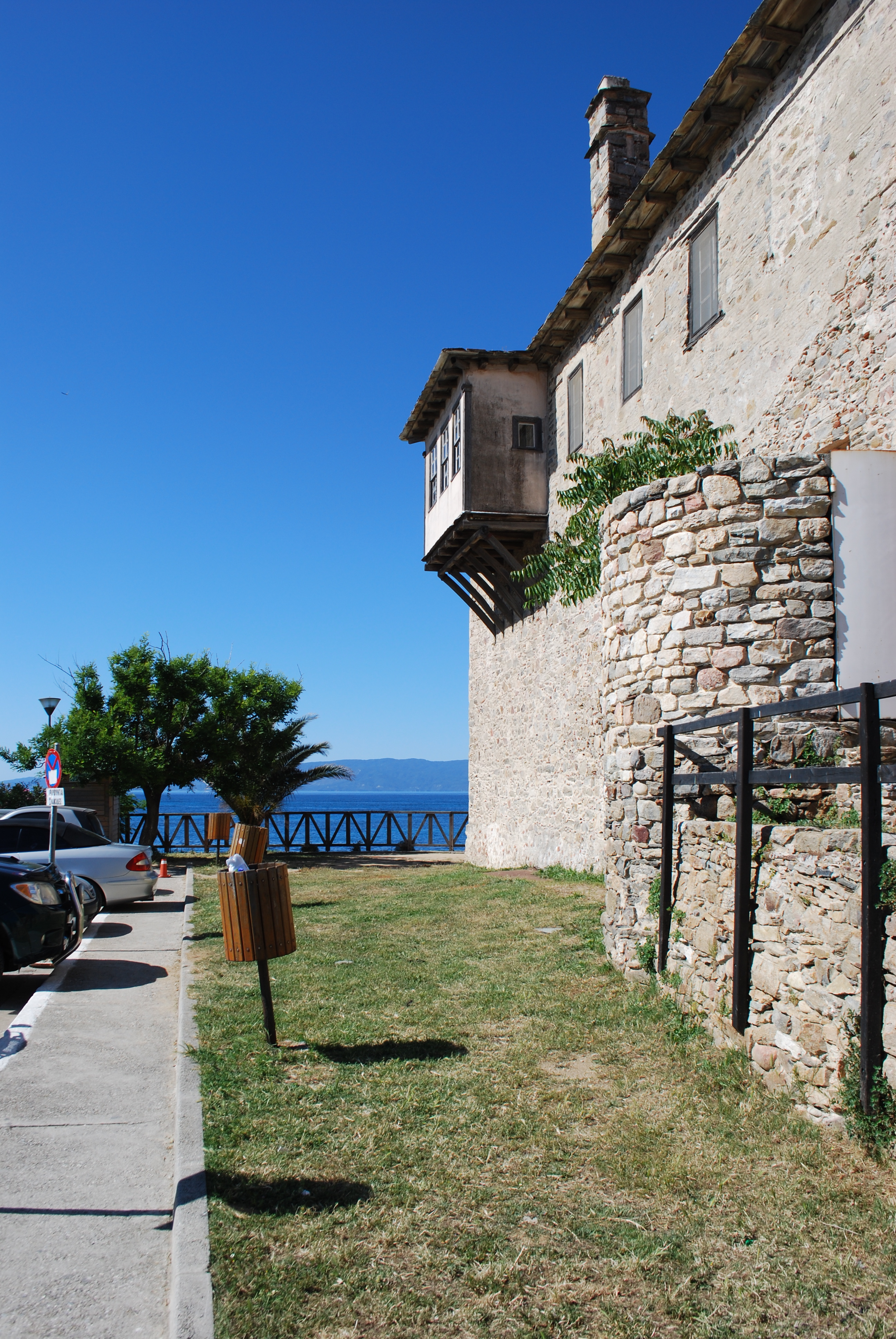 Vue du petit port d'Ouranopolis, point de départ des croisières touristiques le long des côtes du Mont Athos.